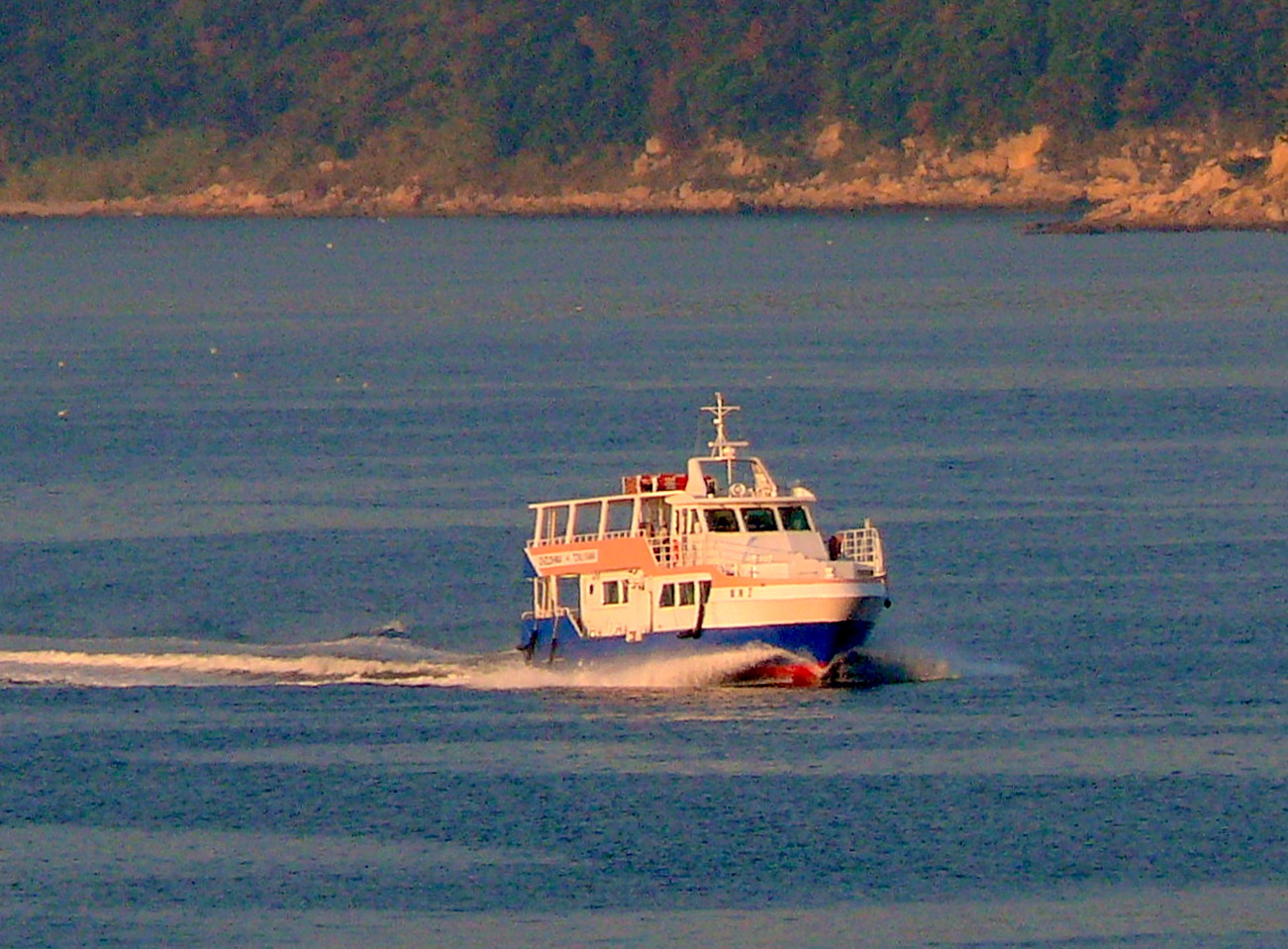 徳山港乗り場へ向う大津島巡航株式会社の旅客船「鼓海Ⅱ」。徳山駅新幹線ホームより撮影。